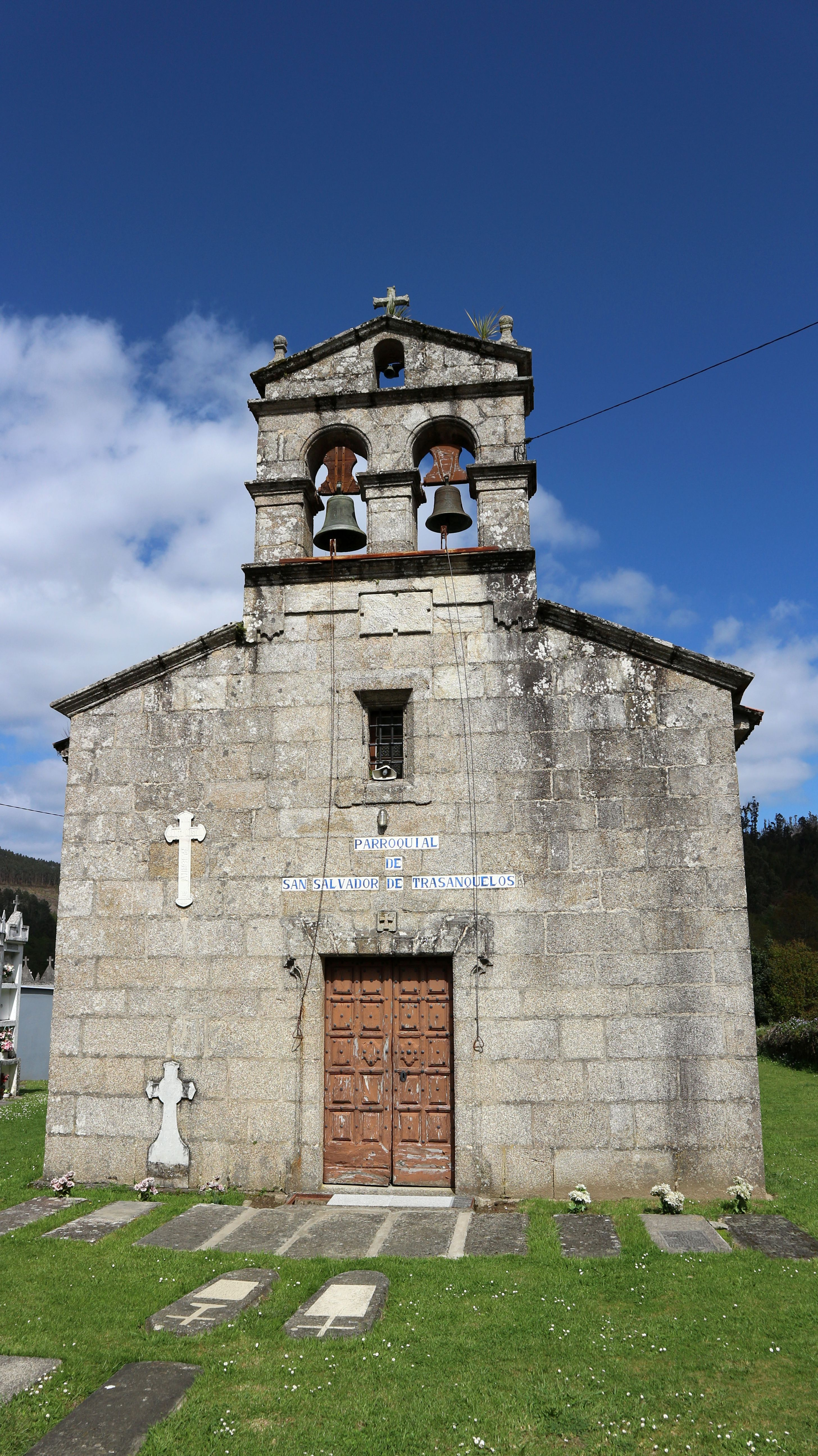 Igrexa de San Salvador de Trasanquelos. Trasanquelos, Oza-Cesuras.